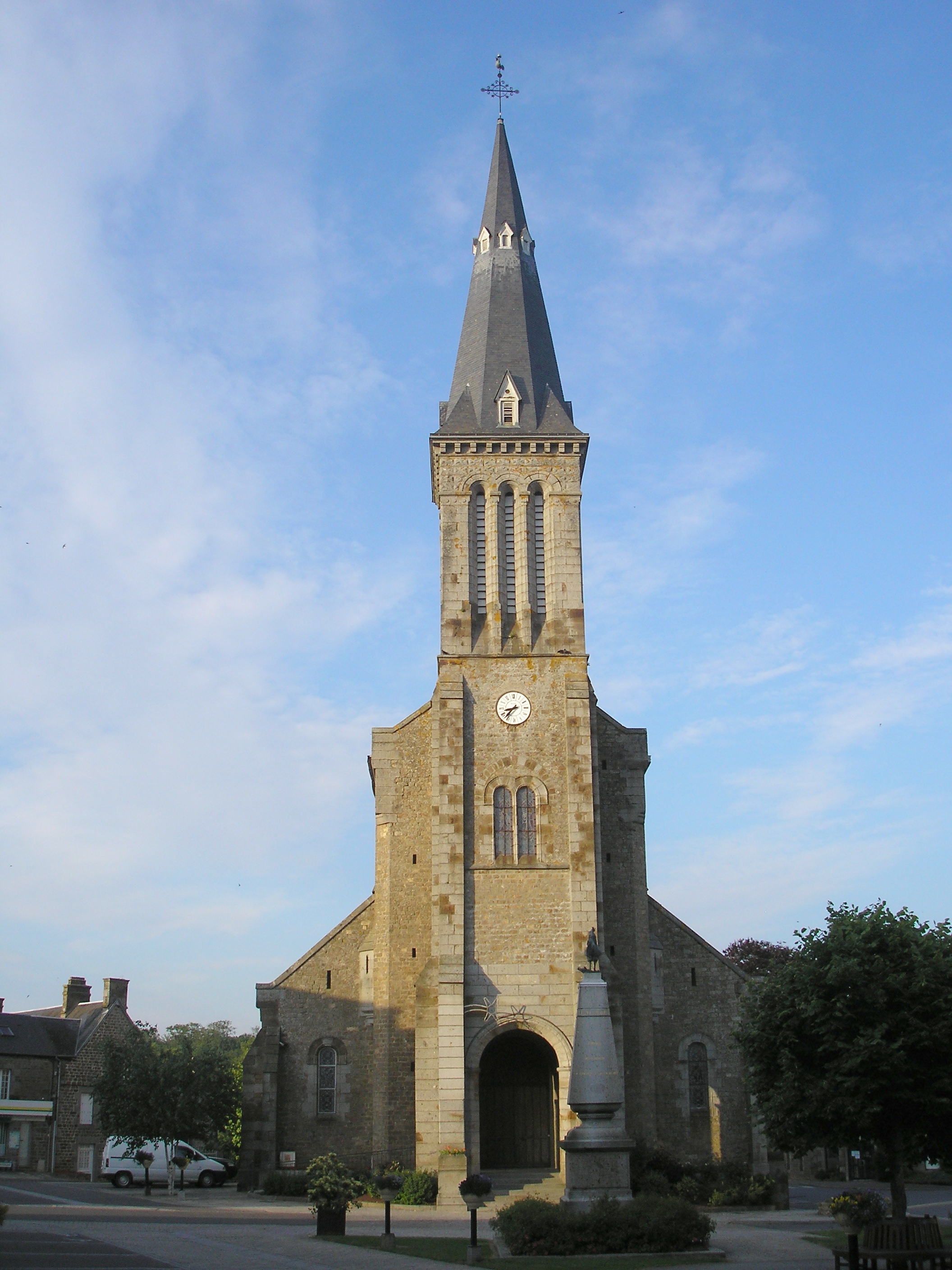 Athis-de-l'Orne (Normandie, France). L'église.